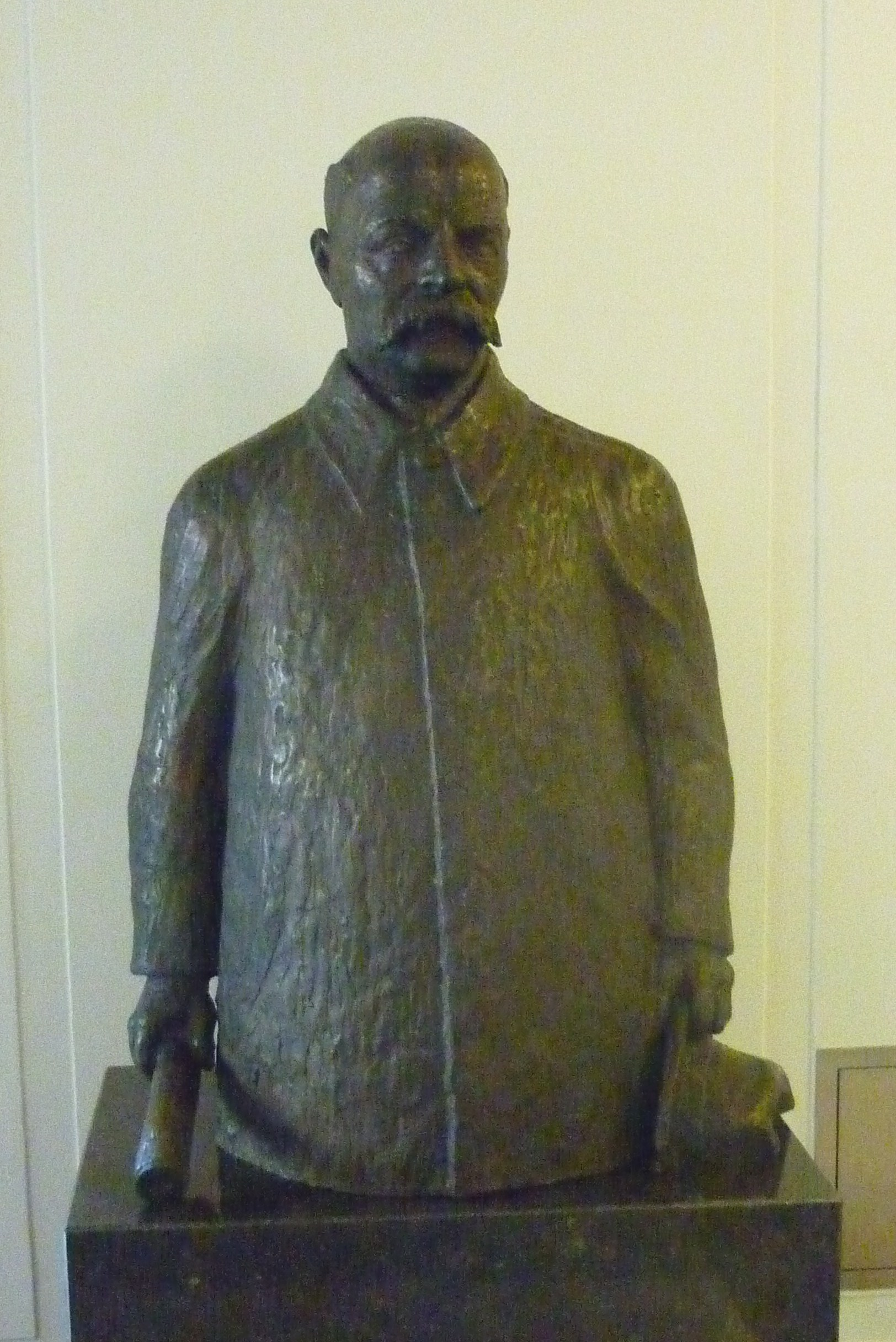 Gerbrandy in de hall van de Tweede Kamer